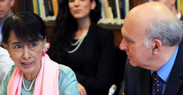 22 June 2012